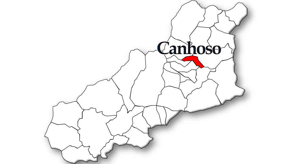 População